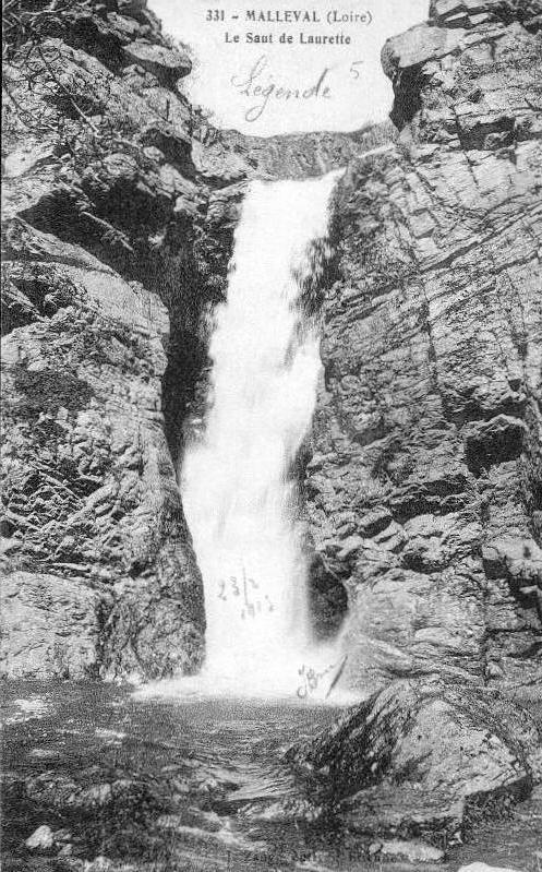 SAUT DE LAURETTE MALLEVAL (42) Ancienne carte postale